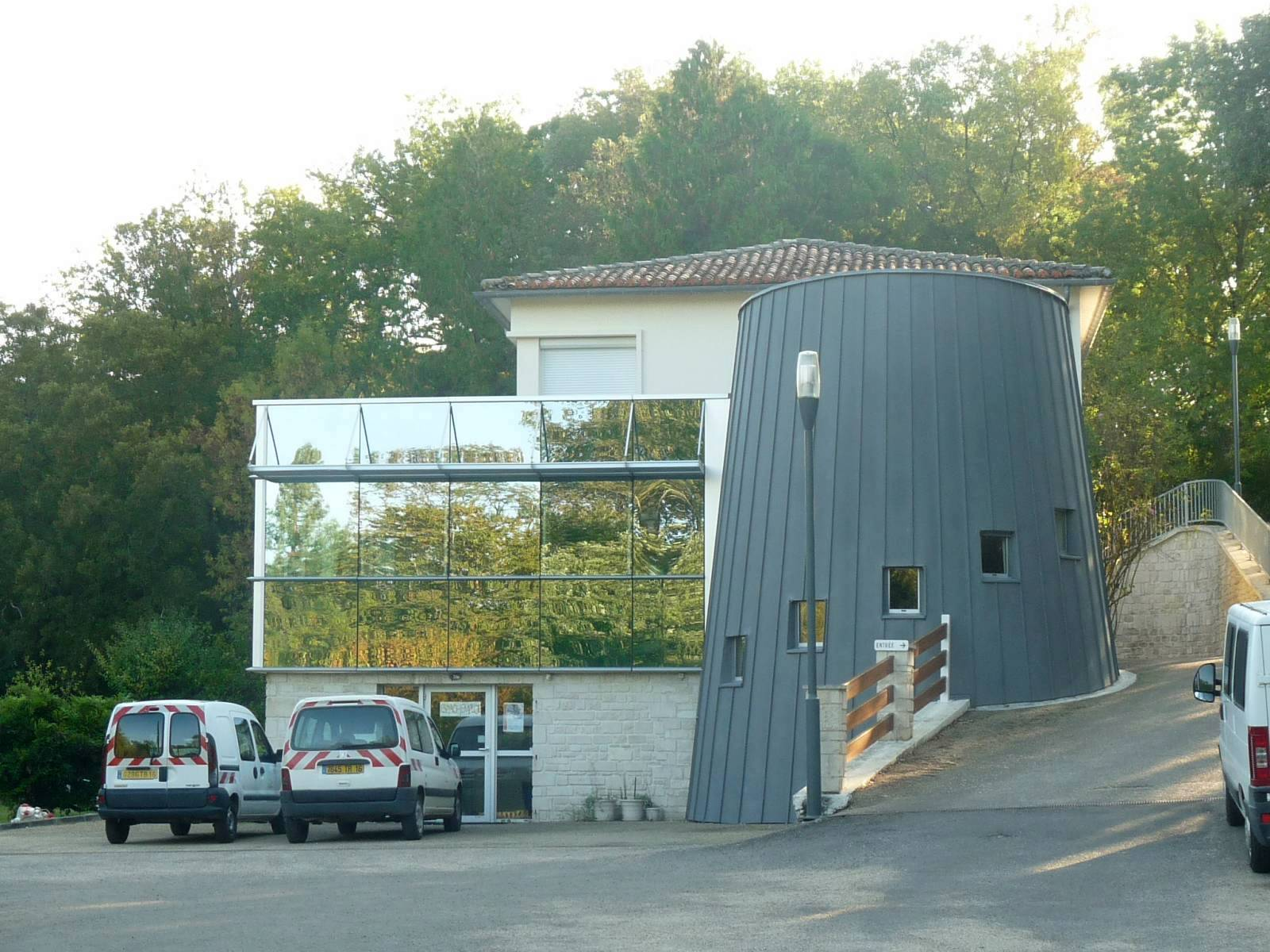 Immeuble de la communauté de communes Charente et Braconne, près de la Charente à Balzac (16), France